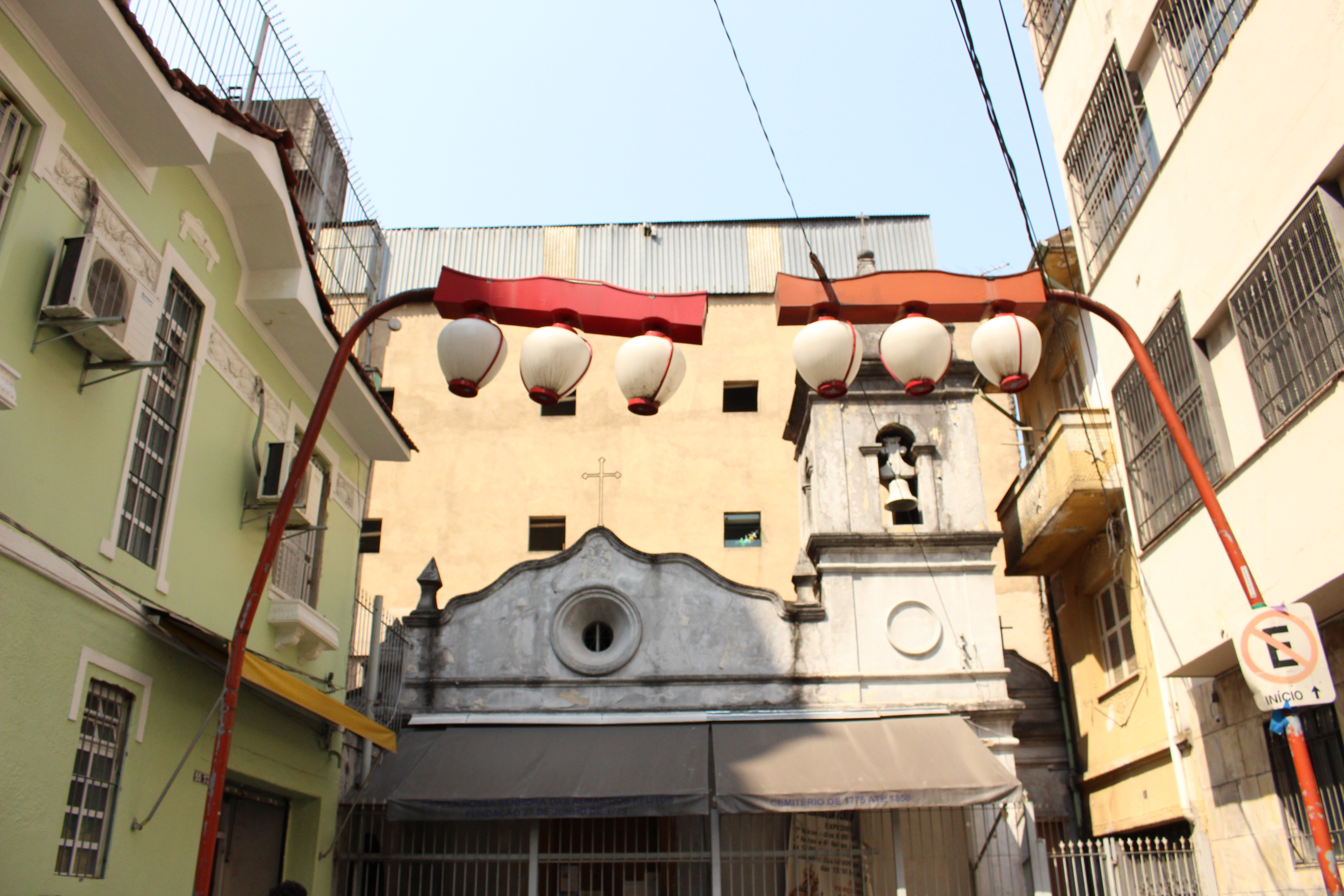 Único remanescente do Cemitério dos Aflitos, construído em 1775, foi o primeiro cemitério da cidade de São Paulo. Localizava-se no atual bairro da Liberdade (bairro de São Paulo). Esteve sob a supervisão da Cúria da Igreja Católica; portanto nunca foi um cemitério público. Foi desativado após a inauguração do cemitério da Consolação em 1858, o primeiro cemitério público da cidade de São Paulo. Fonte: Wikipédia